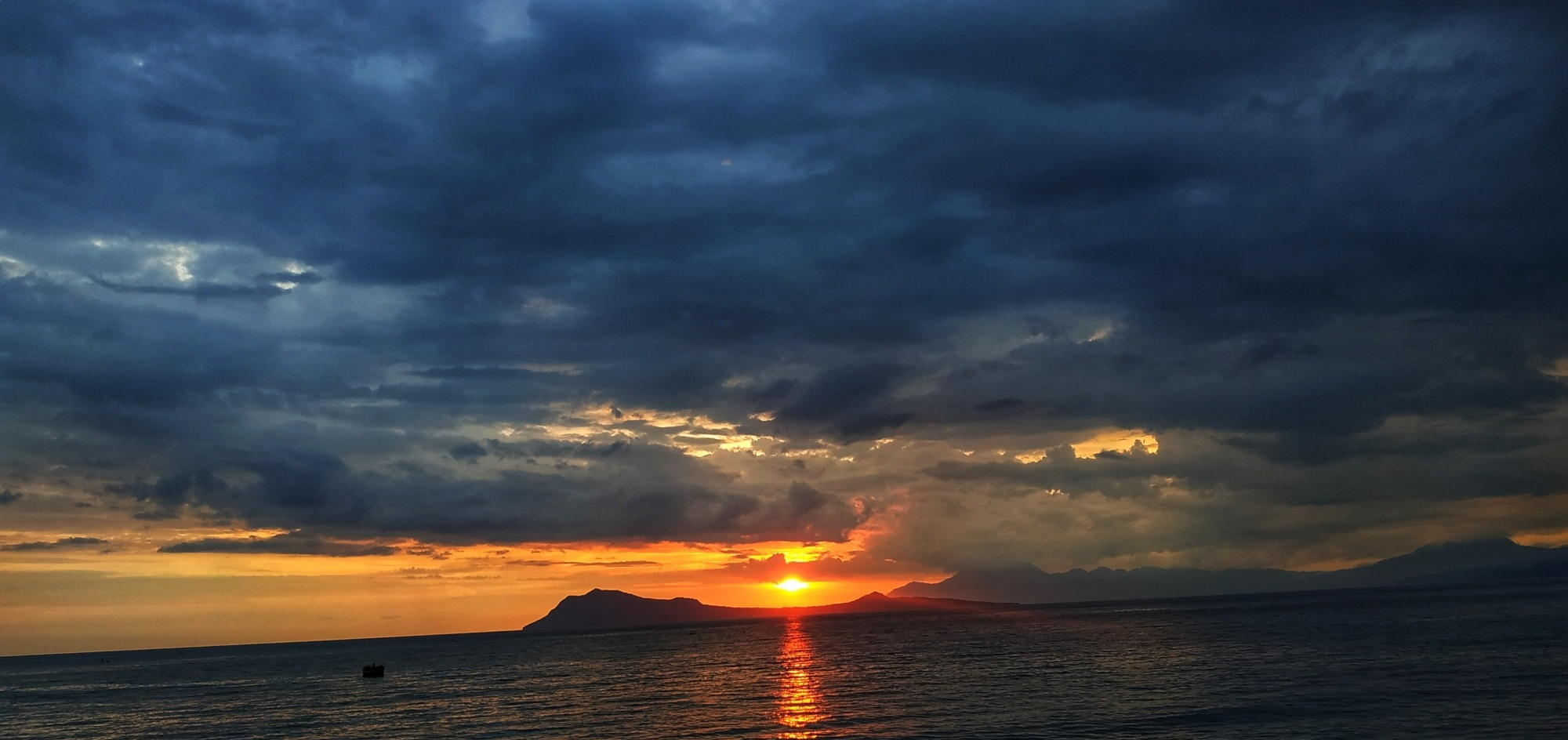 Senja di Pantai Ria saat matahari tenggelam di Pulau Ende.